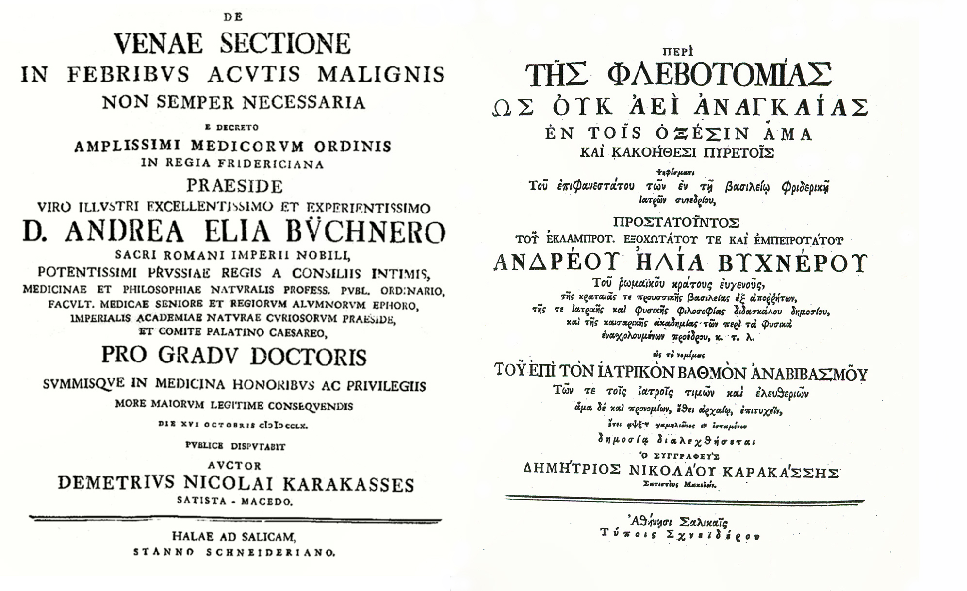 Οι σελίδες τίτλου στη διατριβή του Δημητρίου Καρακάση ( Halle, 1760)